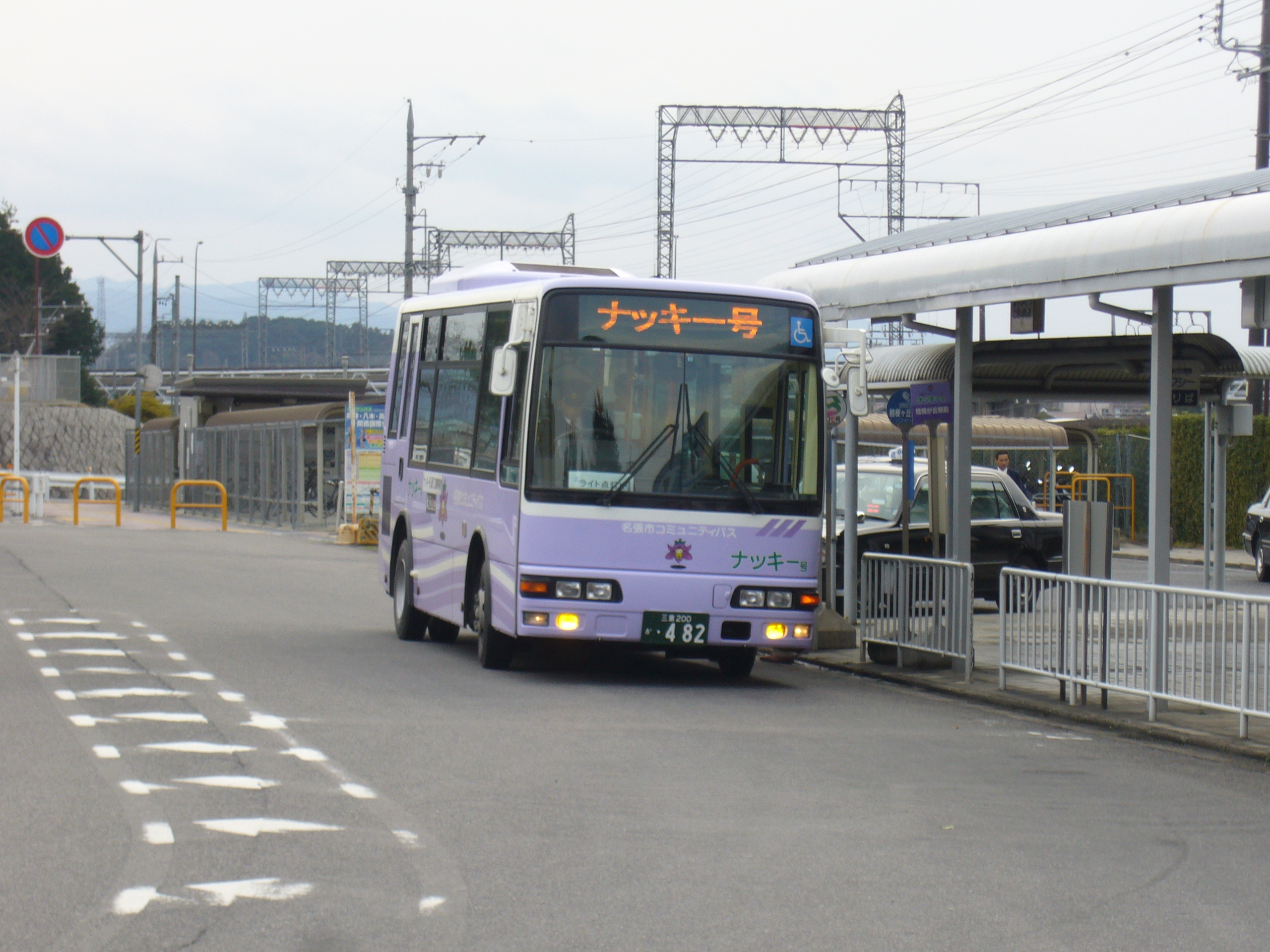 名張市コミュニティバス（ナッキー号）の写真